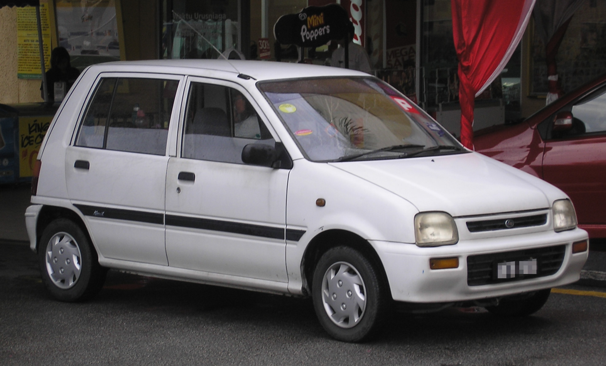 Front-side shot of a first generation Perodua Kancil, in Sungai Besi, Kuala Lumpur, Malaysia.